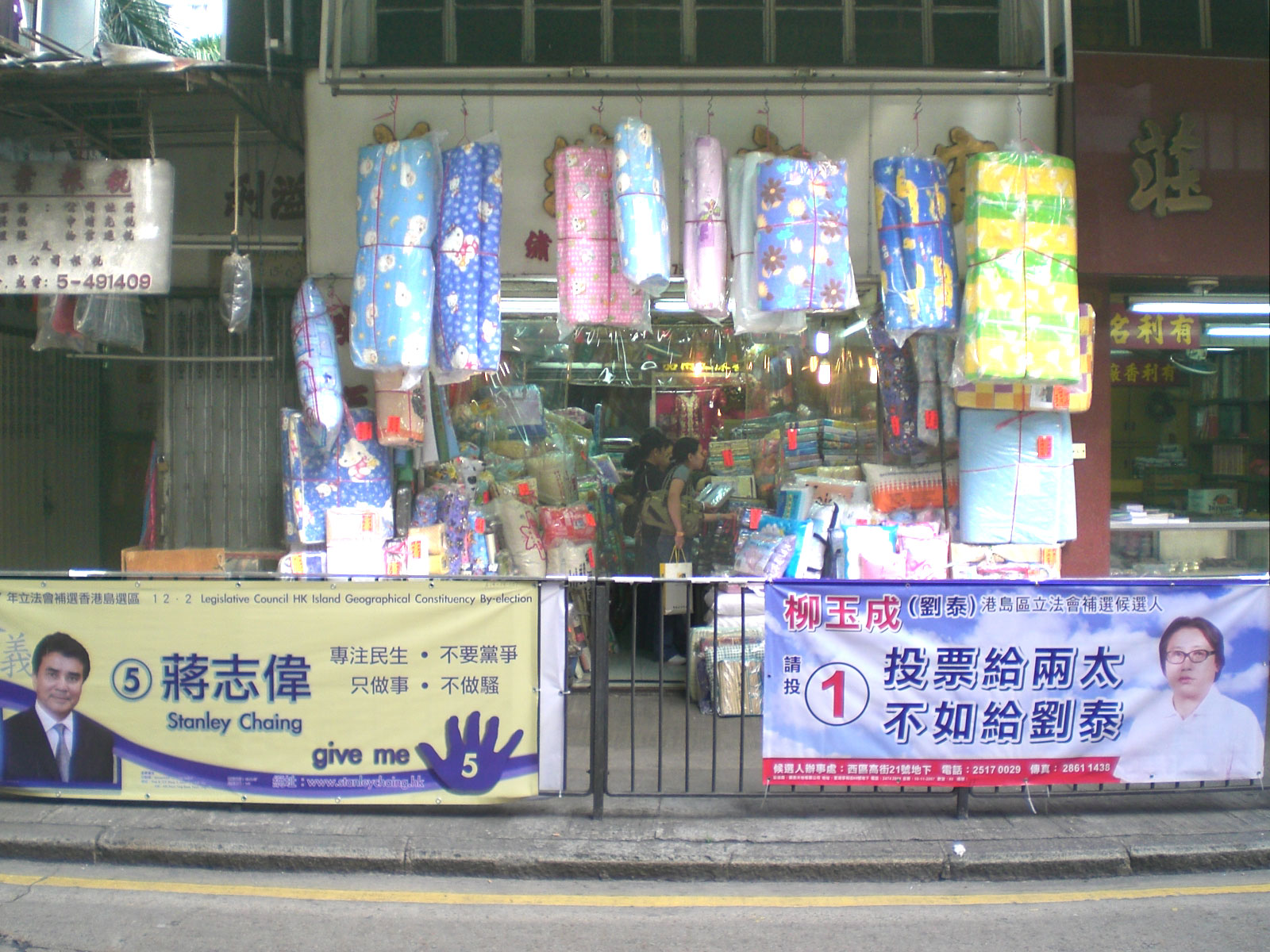 2007年香港立法會港島選區補選Banners 位於西營盤皇后大道西近東邊街的街邊宣傳橫額 - 蔣志偉 & 柳玉成(劉泰)